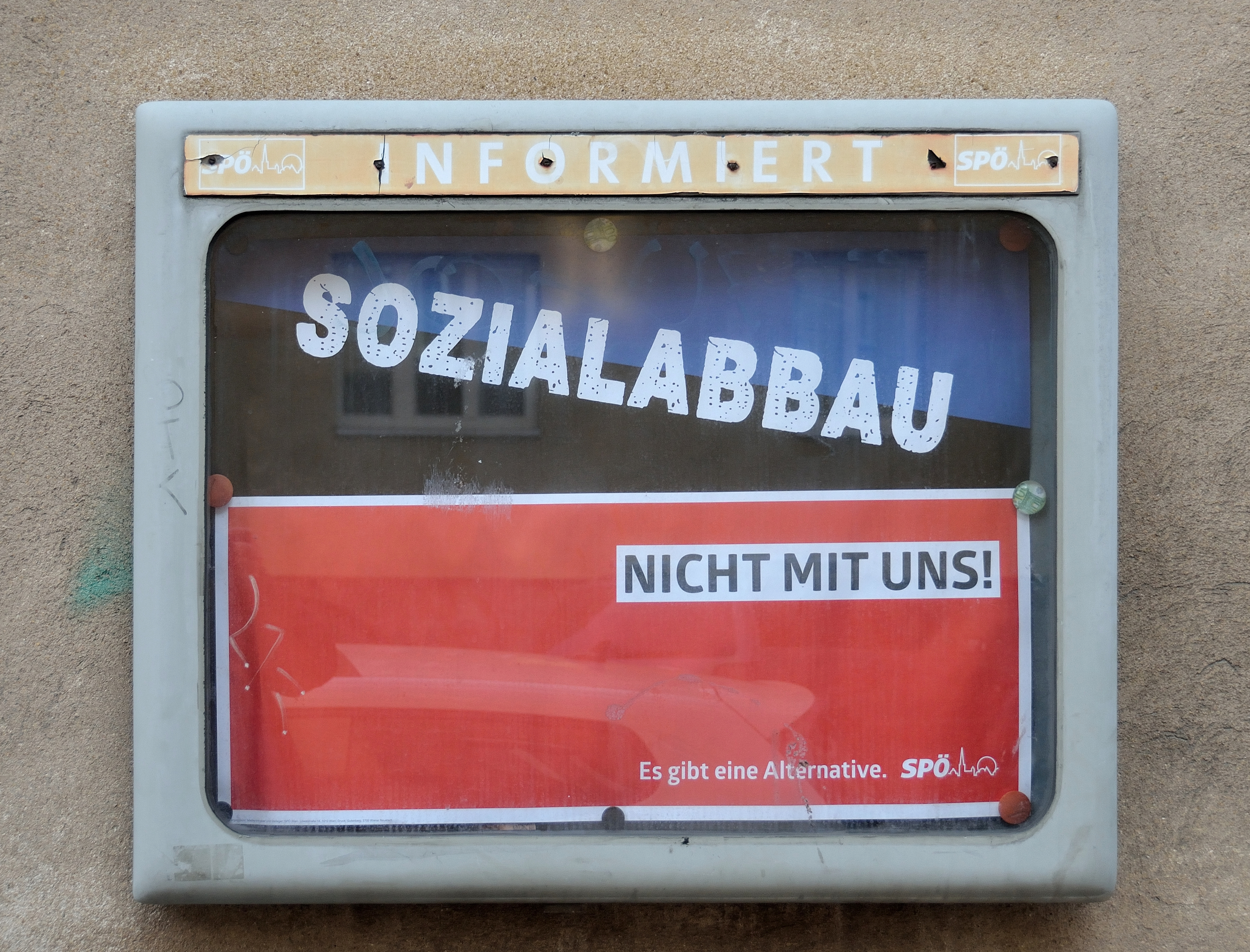 Schaukasten der SPÖ Wien am Ernst-Reuter-Hof in Wien Meidling. Sozialabbau nicht mit uns! Es gibt eine Alternative. SPÖ